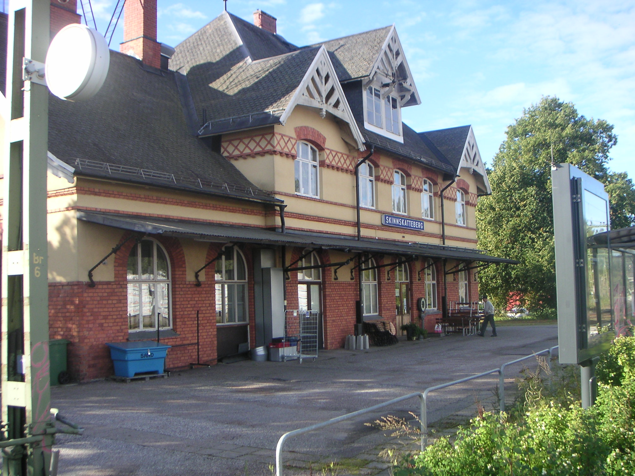 Skinnskatteberg - Järnvägsstationen